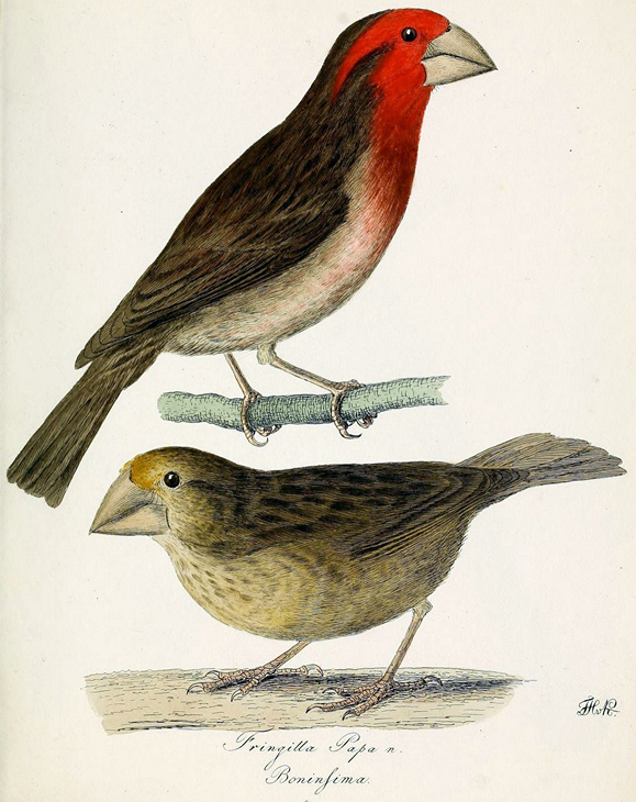 Illustration from Über einige Vögel von Chili : beobachtet im März und anfang April 1827. By von F.H. von Kittlitz. Published in St. Petersburg :Académie impériale des sciences,1830-1835.